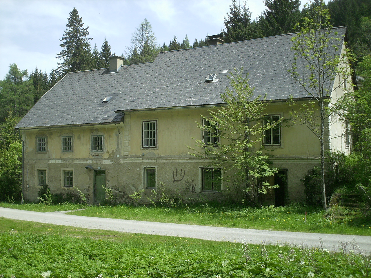 Ehem. Konsumhaus, Schule im Knappengraben.